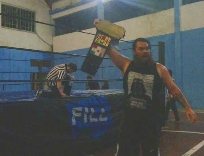 Black Bird com o Título Absoluto da Fill